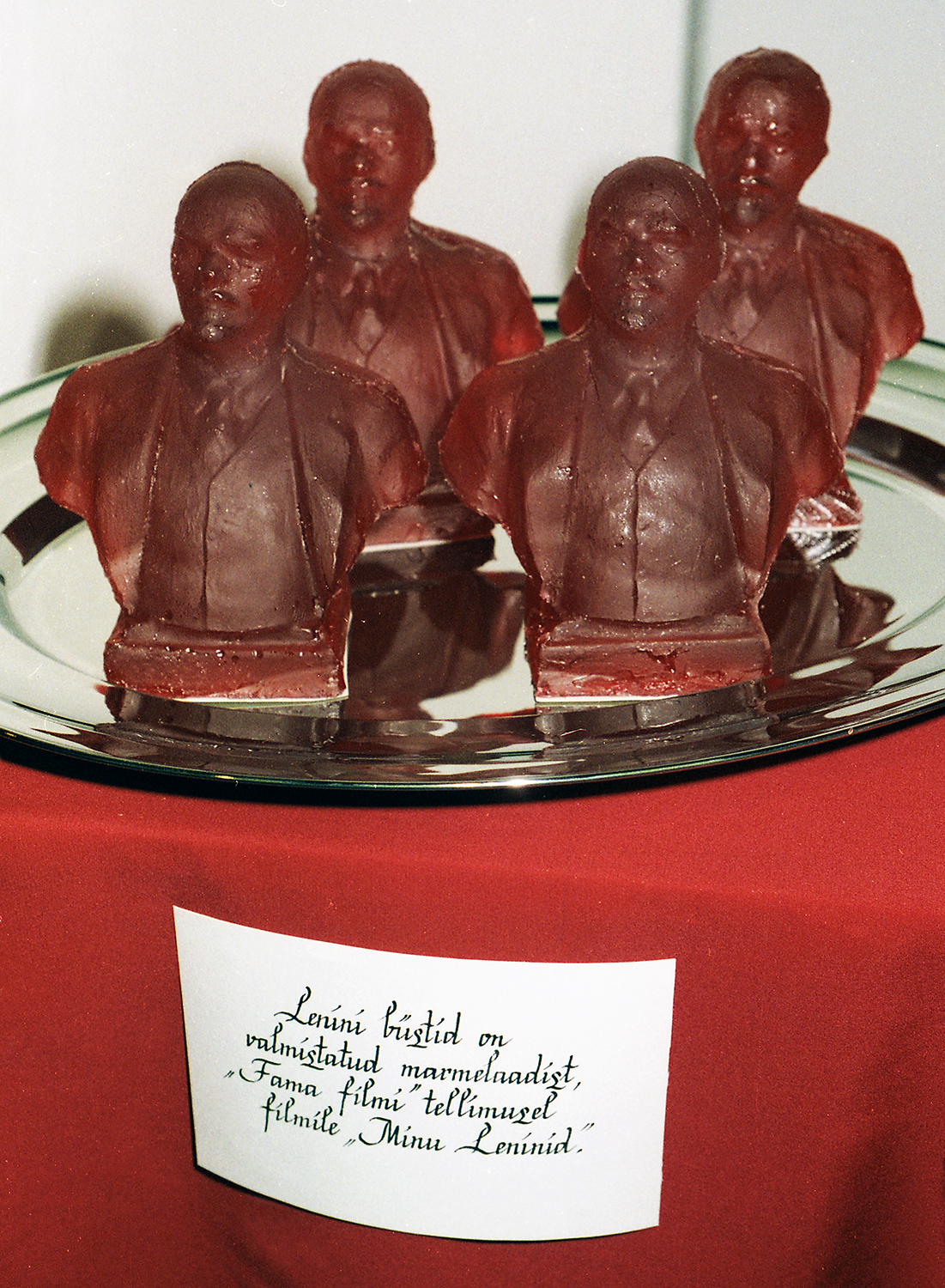 Lenini büstid filmile Minu Leninid 97